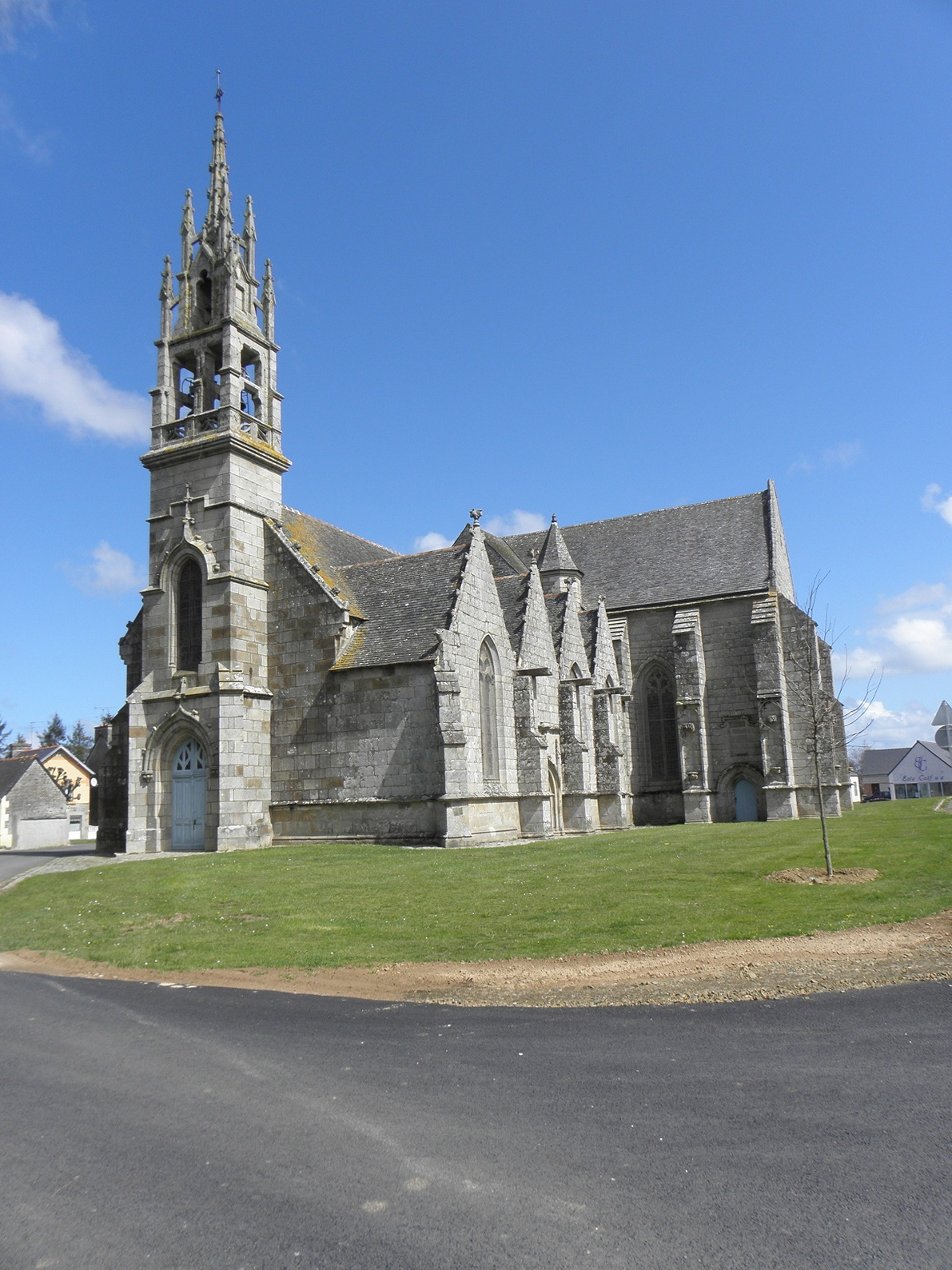 Façade occidentale et flanc sud de la chapelle Notre-Dame-de-la-Cour en Lantic (22).